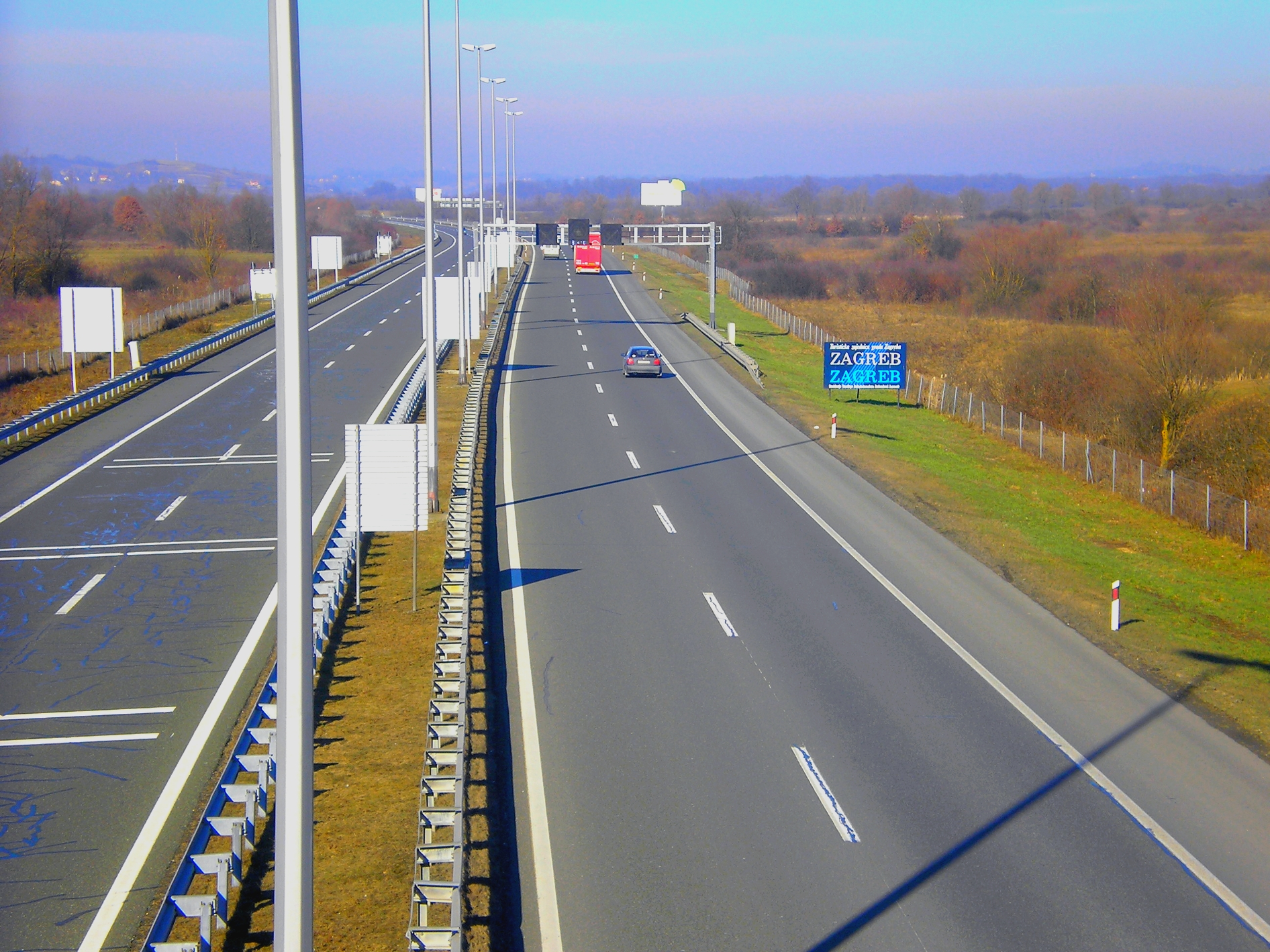 Autocesta Zagreb-Macelj (Highway Zagreb-Macelj)